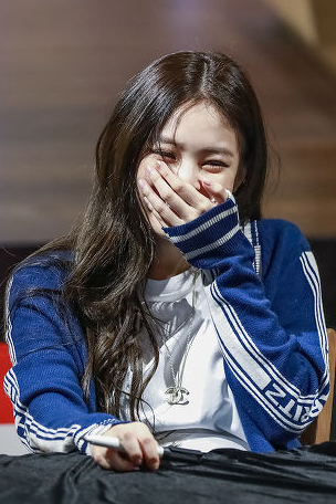 Jennie Kim no fansign de SOLO em Gangnam Shinsegae, em 16 de dezembro de 2018